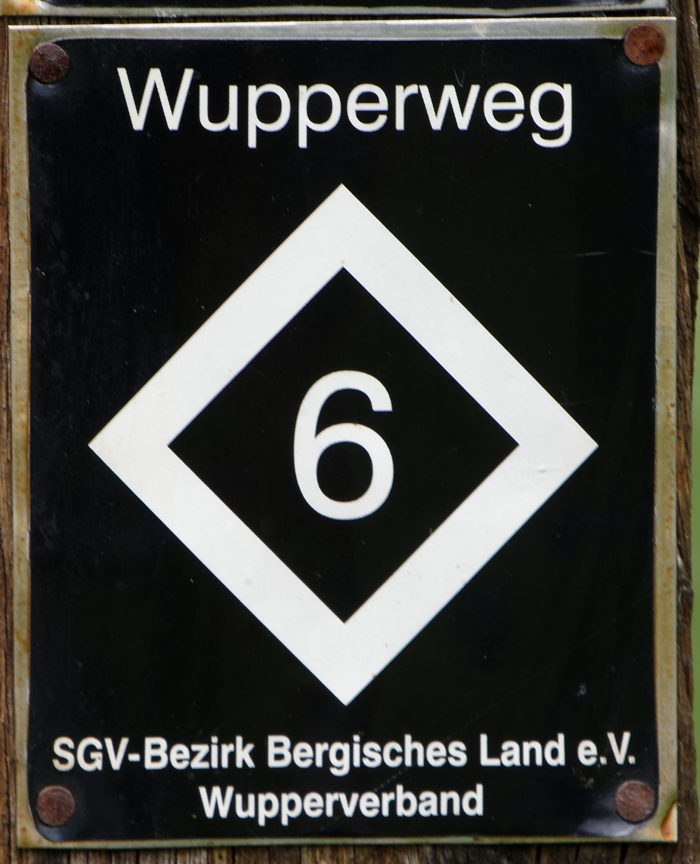 Wupperweg